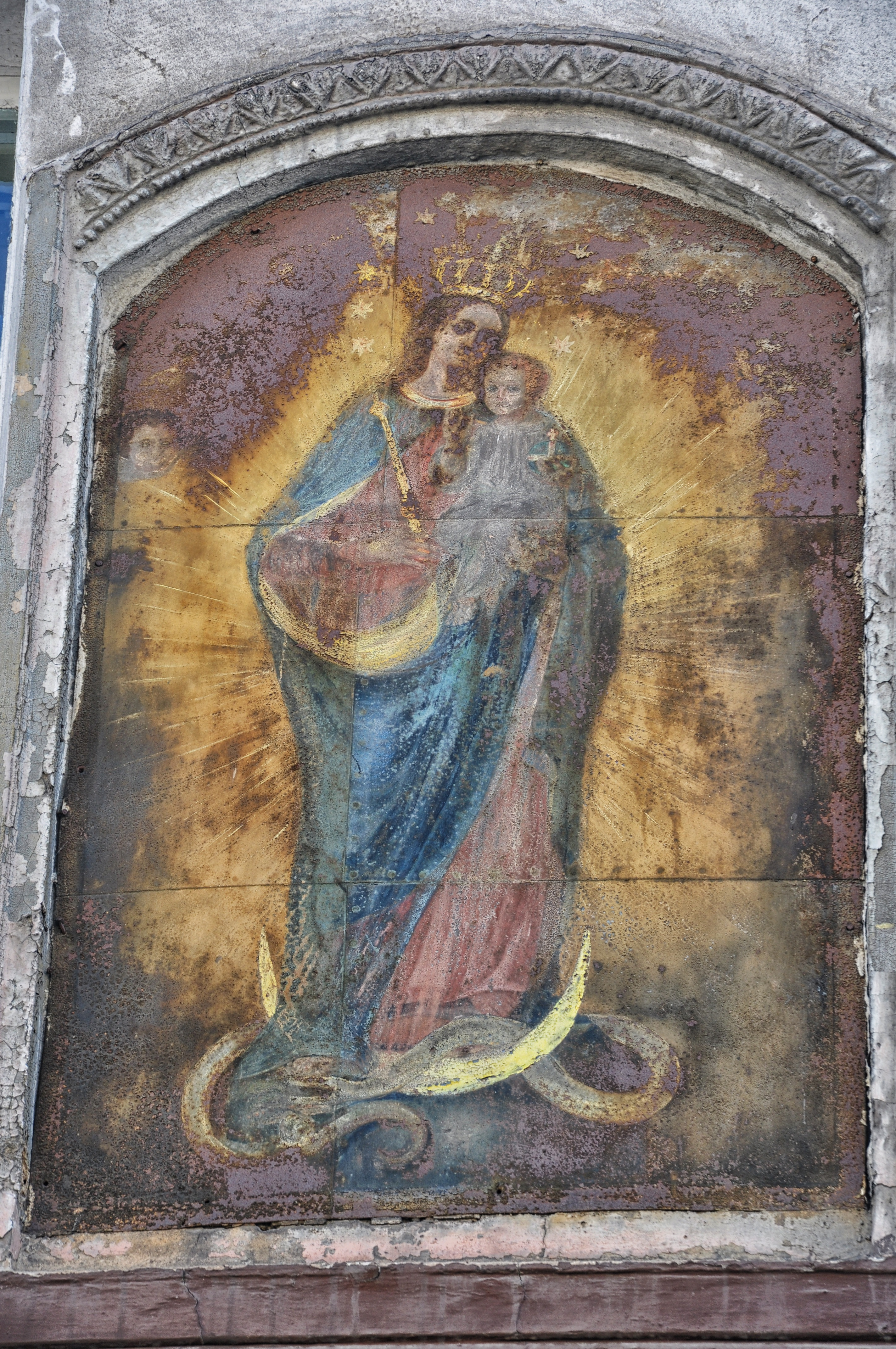 Malowidło Matki Boskiej Prudnickiej na budynku w Prudniku.